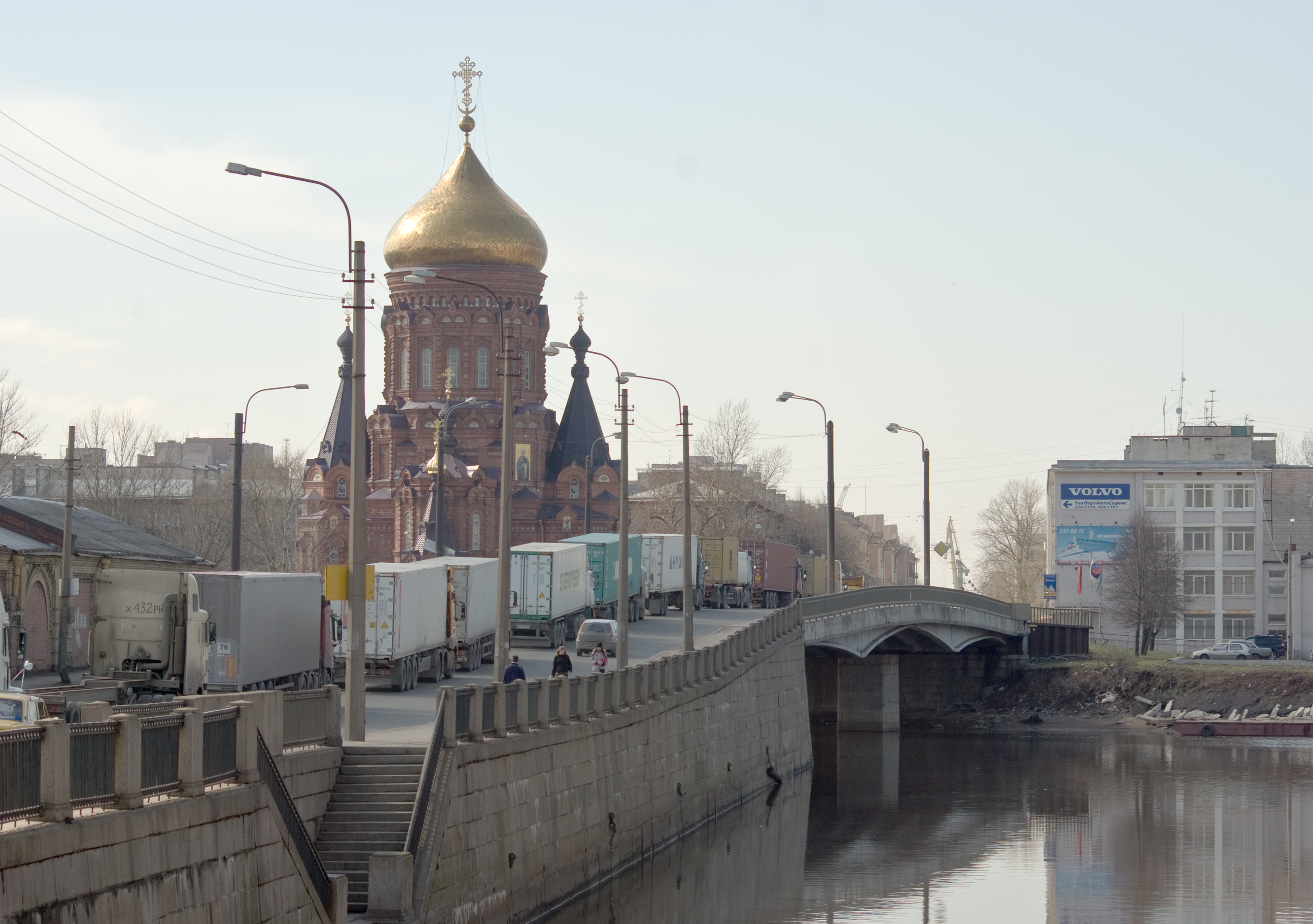 Гутуевский мост через реку Екатерингофка (Санкт-Петербург). Конец Обводного канала. Церковь богоявления господня (Гутуевская).